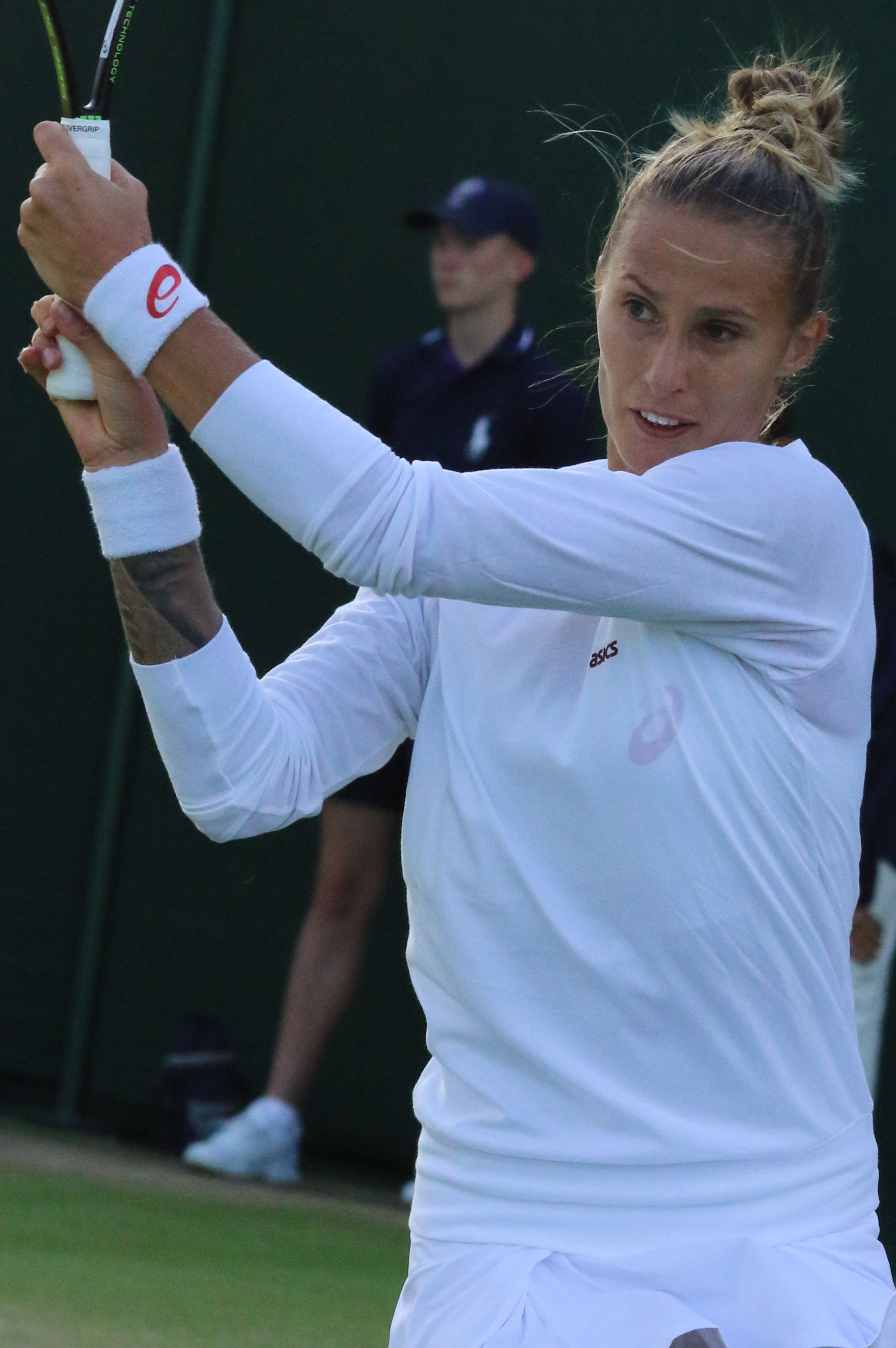 Hercog WM16 (4)